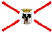 Bandera del Municipio de Santa Ursula